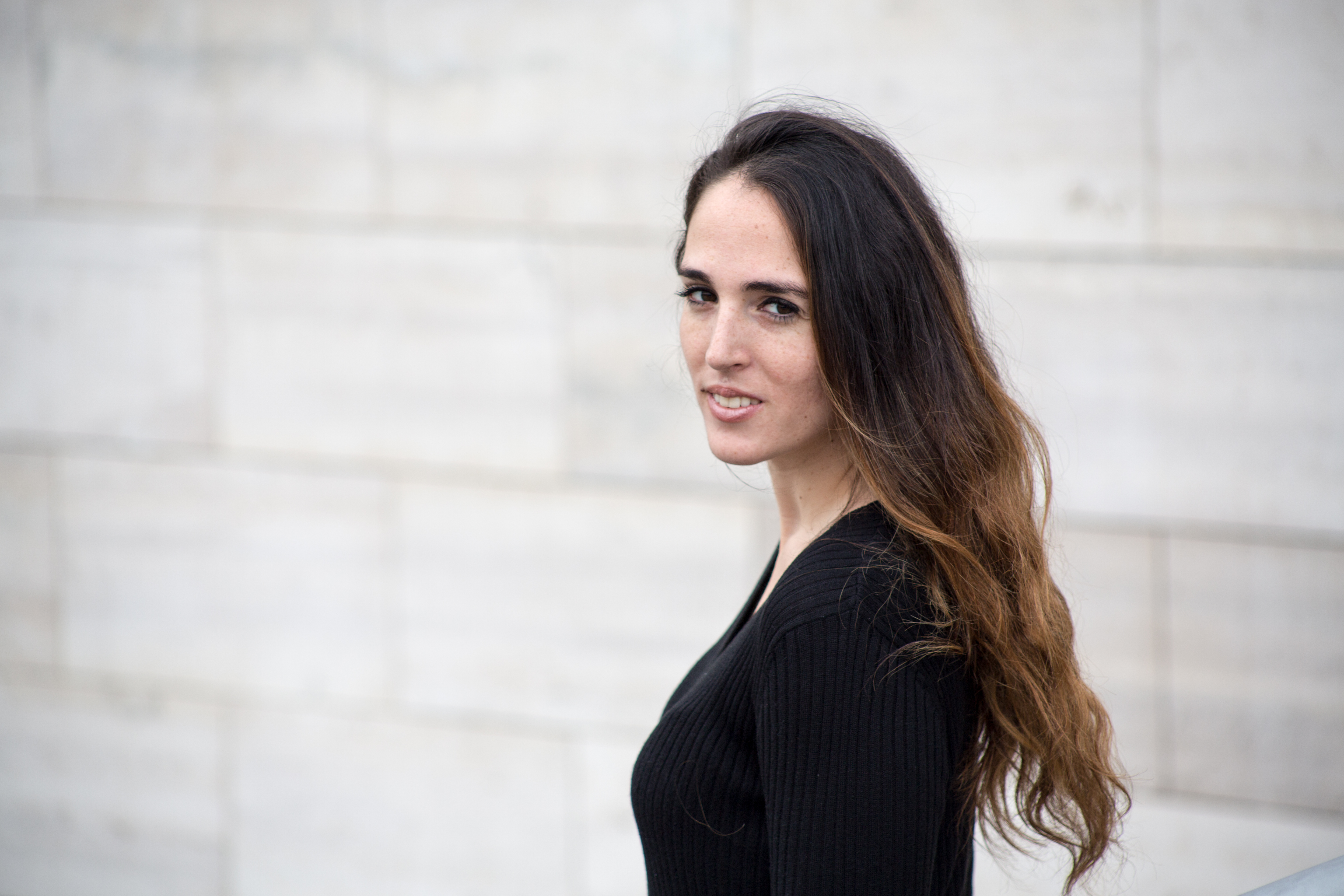 La escritora chilena Montserrat Martorell, autora de La última ceniza.